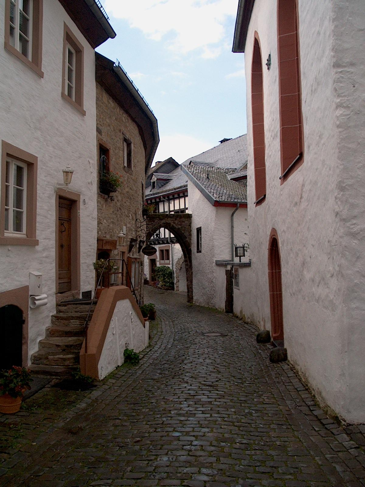 Ortsansicht Kronenburg, Kreis Euskirchen, rechts Pfarrkirche St. Johann Baptist